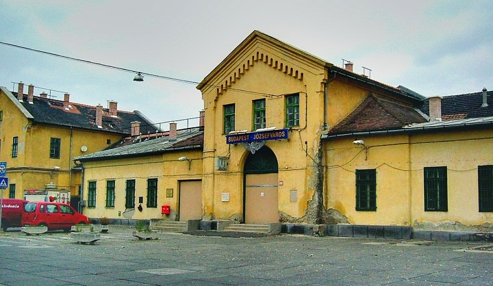 Józsefvárosi pályaudvar, Budapest